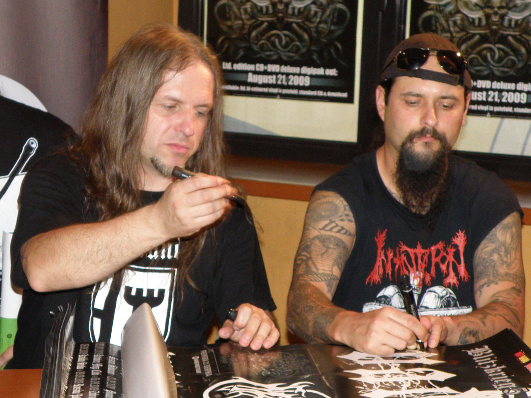 Vader, Warszawa, EMPiK Megastore Nowy Świat, ul. Nowy Świat 15/17 (29 sierpnia 2009)